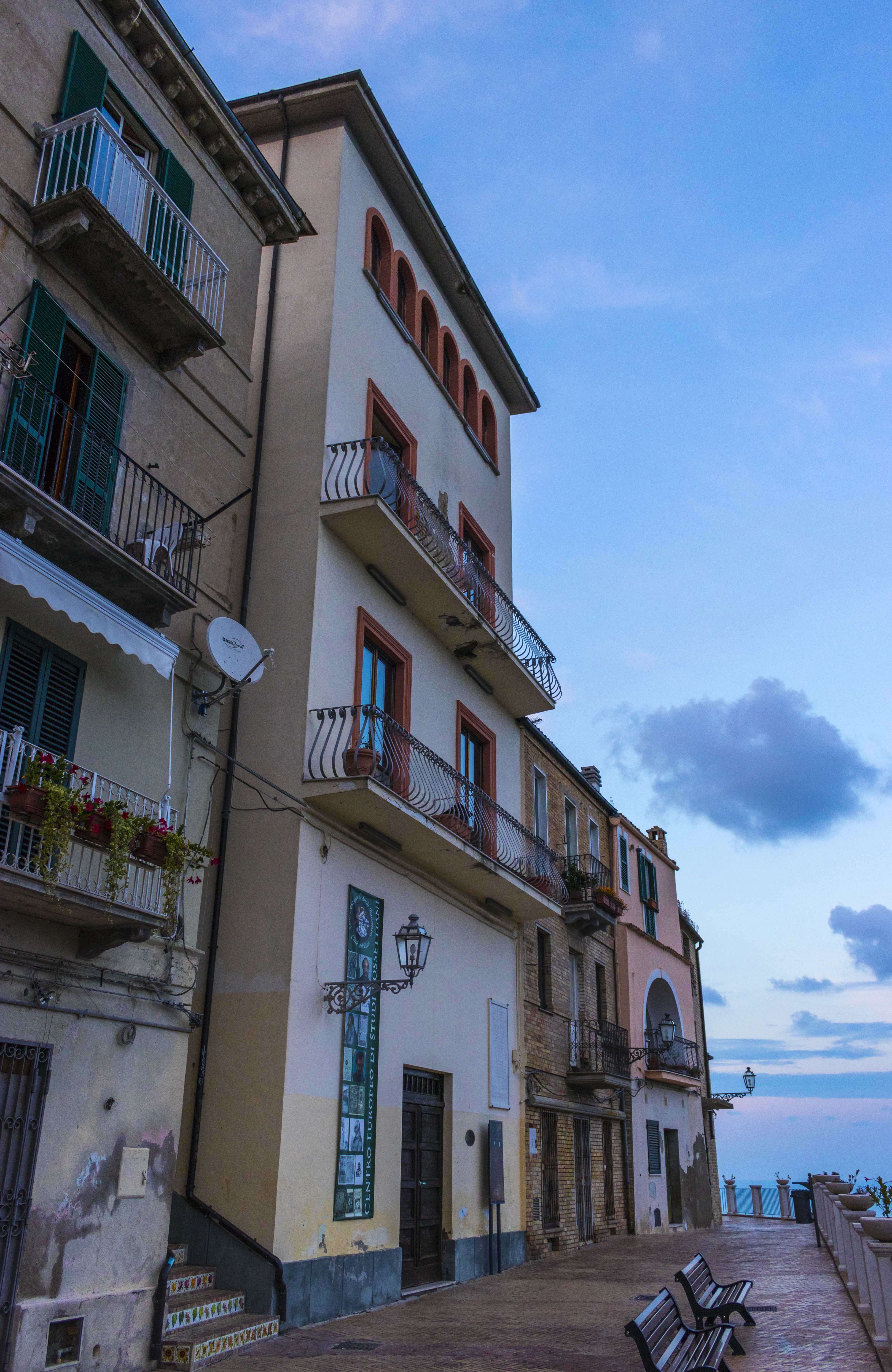 La Biblioteca Casa Rossetti di Vasto. This is a photo of a monument which is part of cultural heritage of Italy.